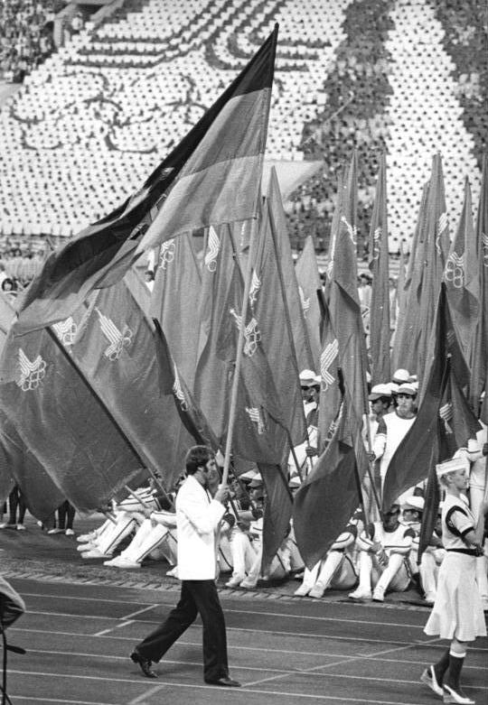 ADN-ZB Frotscher 03.08.80 Moskau: Olympia-Abschluß- Mit einer beeindruckenden Abschlußveranstaltung wurden die XXII. Olympischen Spiele im Lenin-Stadion von Lushniki beendet. Entsprechend dem olympischen Reglement wurde der Nationeneinmarsch durch die Fahnenträger eröffnet. Die Fahne der DDR trug der Olympiasieger von Montral und Moskau im Marathonlauf, Waldemar Cierpinski.